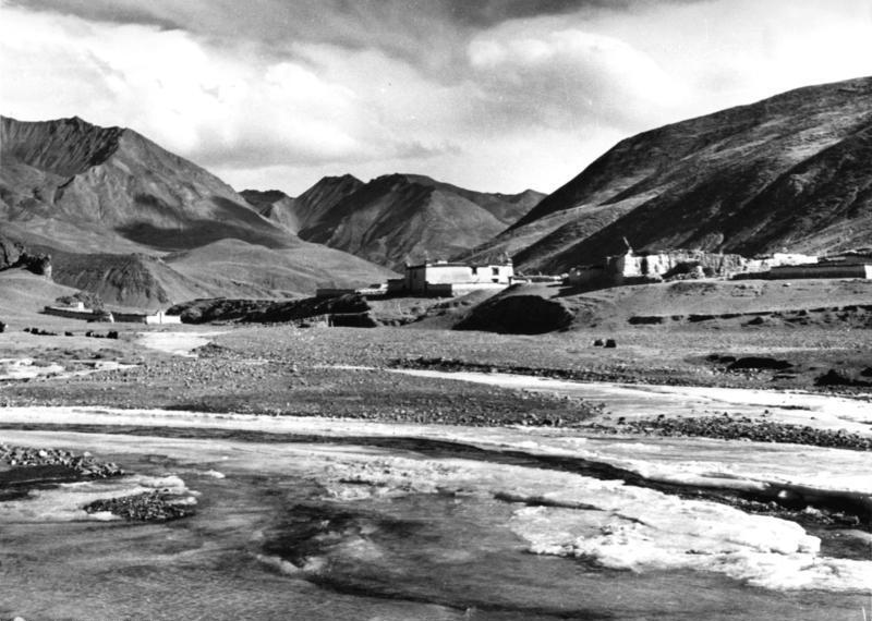 Ralung, Ortschaft mit Rasthaus